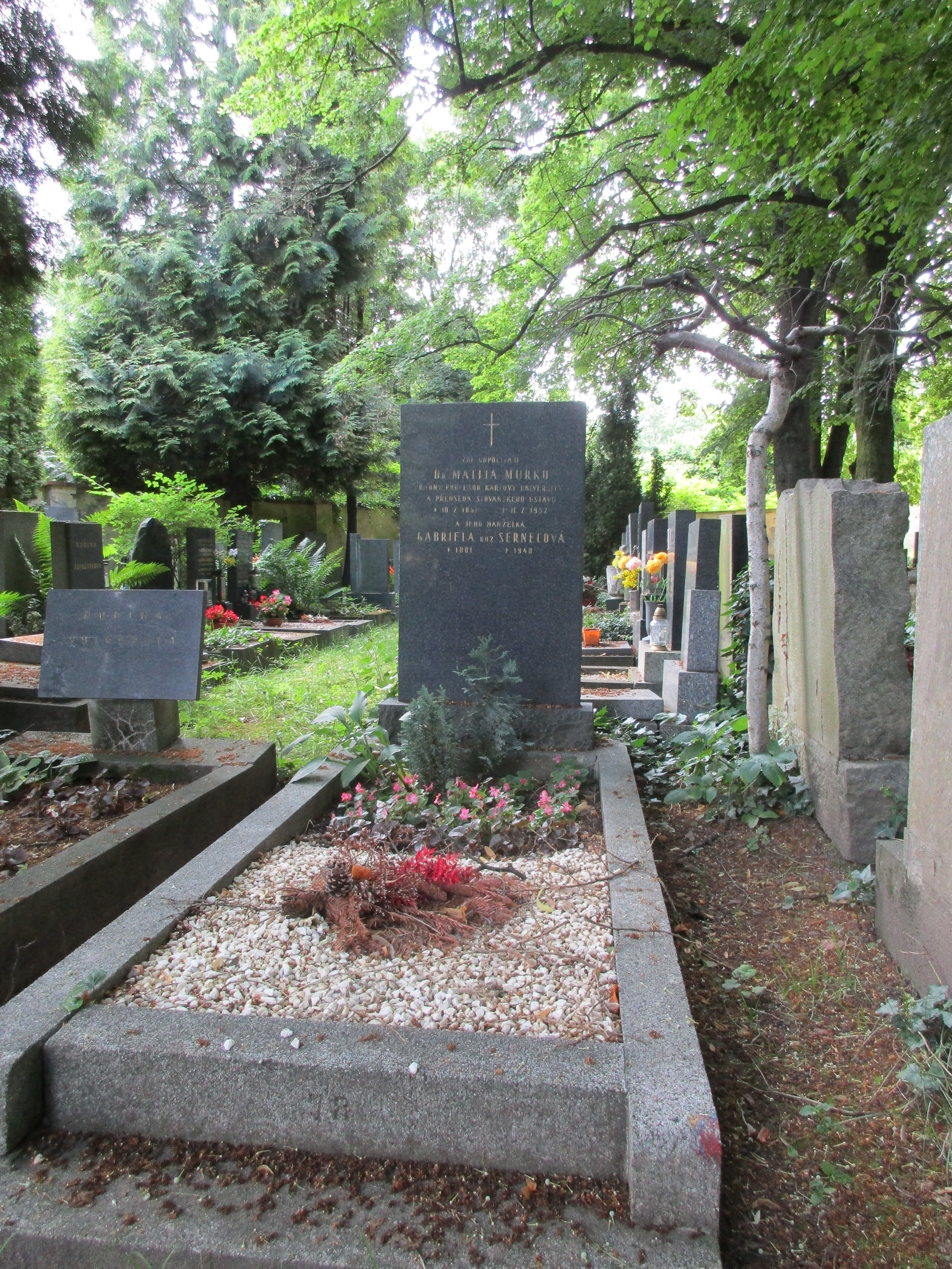 Hrob dr.Matiji Murka, spisovatele a literárního historika, profesora slovanské filologie na UK v Praze, spoluzakladatele časopisu Slavia. Kulturní památka.